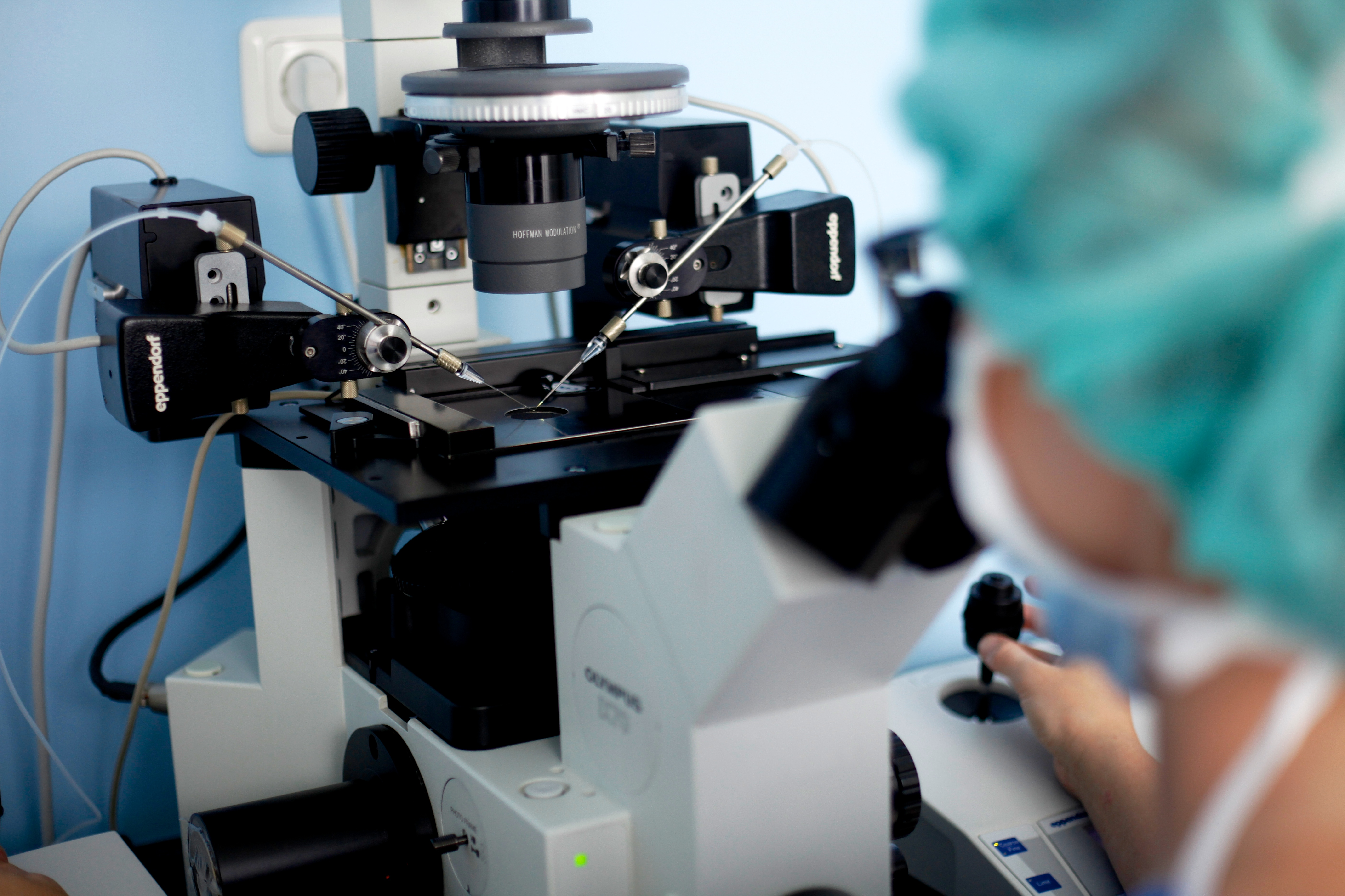 ilustrační foto ISCARE